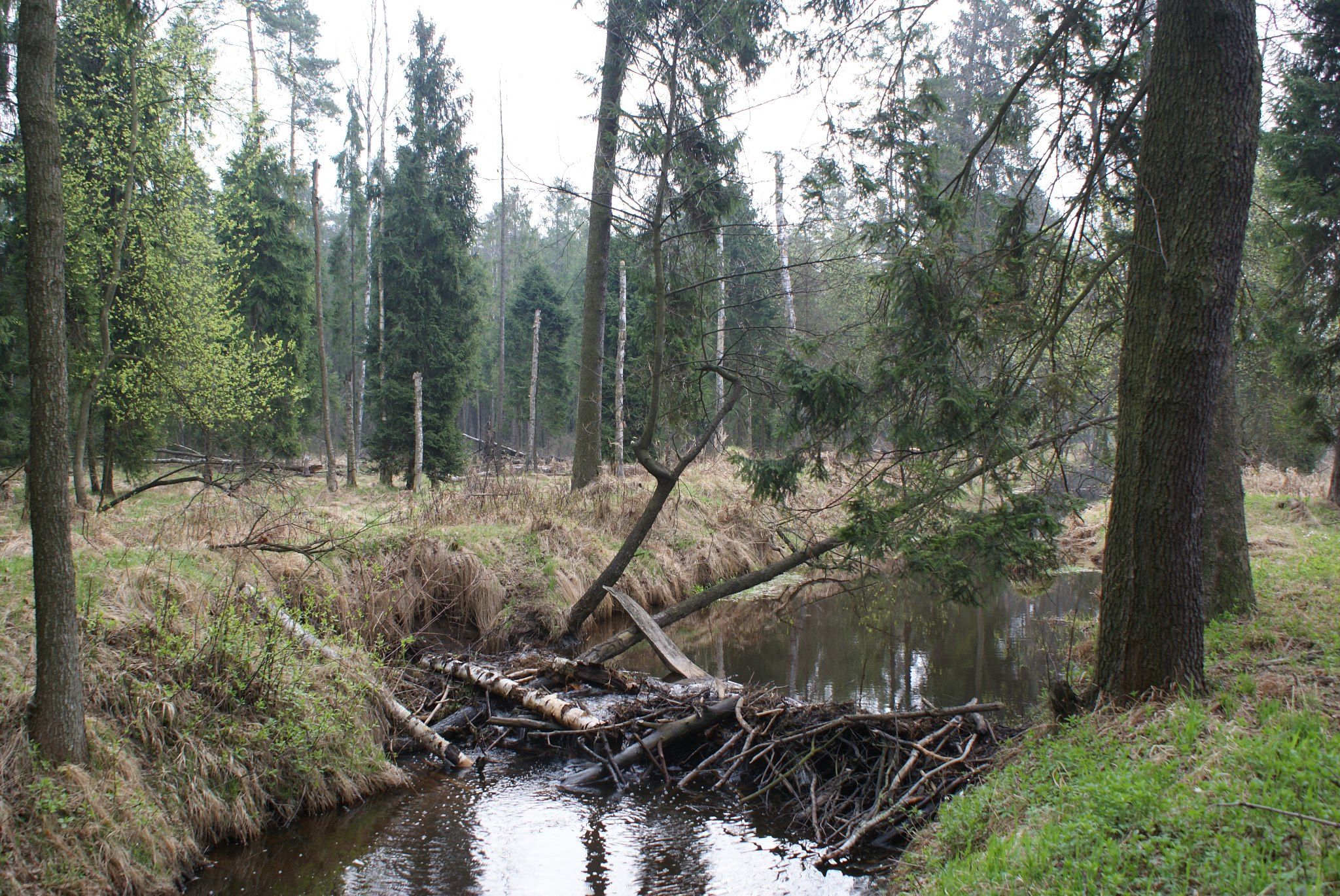 Tama bobrów na rzece Chechło w Puszczy Dulowskiej.